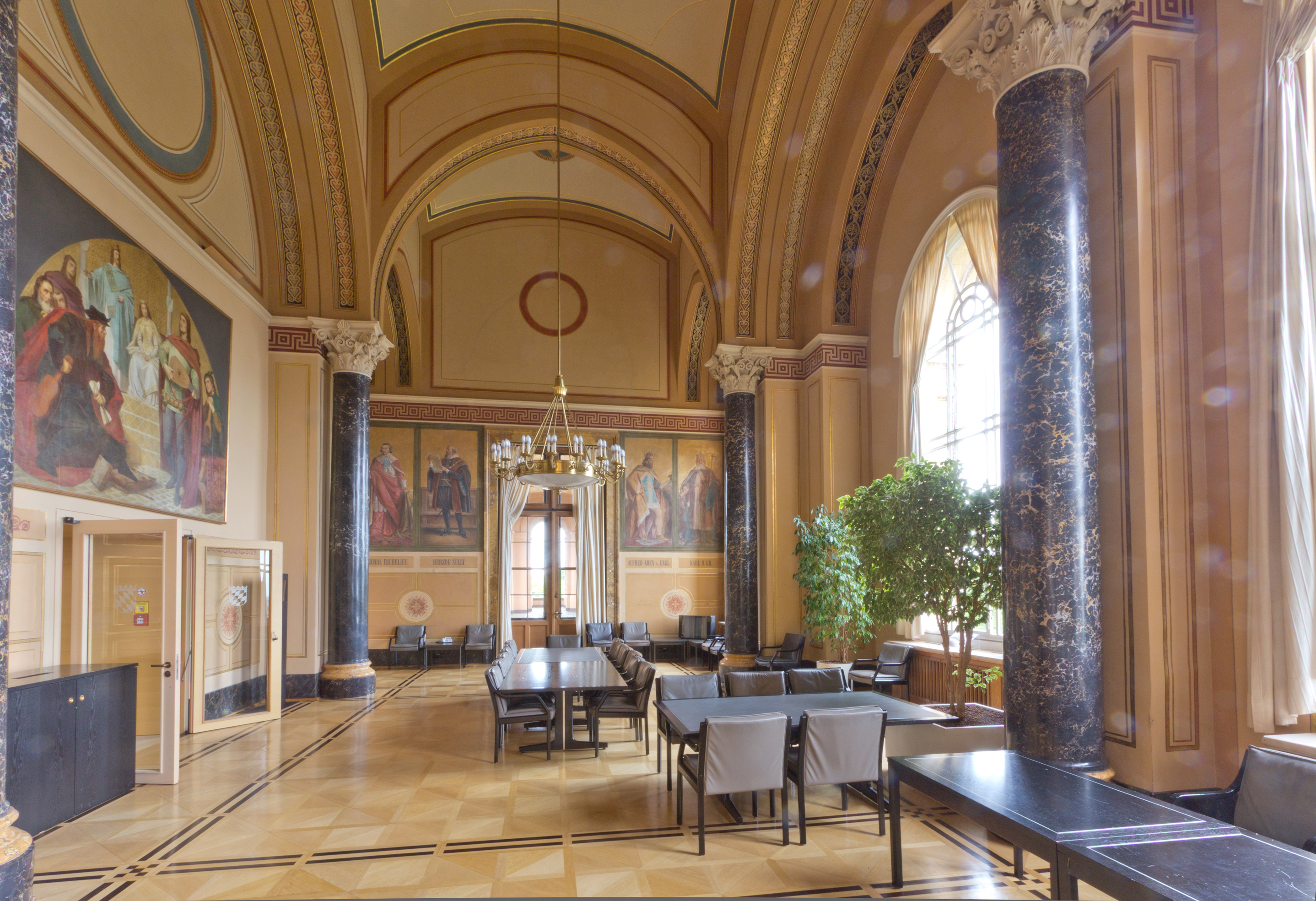 Wikipedia im Landtag – Bayern 17. bis 19. Juli 2012 in München Dieses Foto wurde im Rahmen des Projektes „Wikipedia im Landtag“ erstellt.